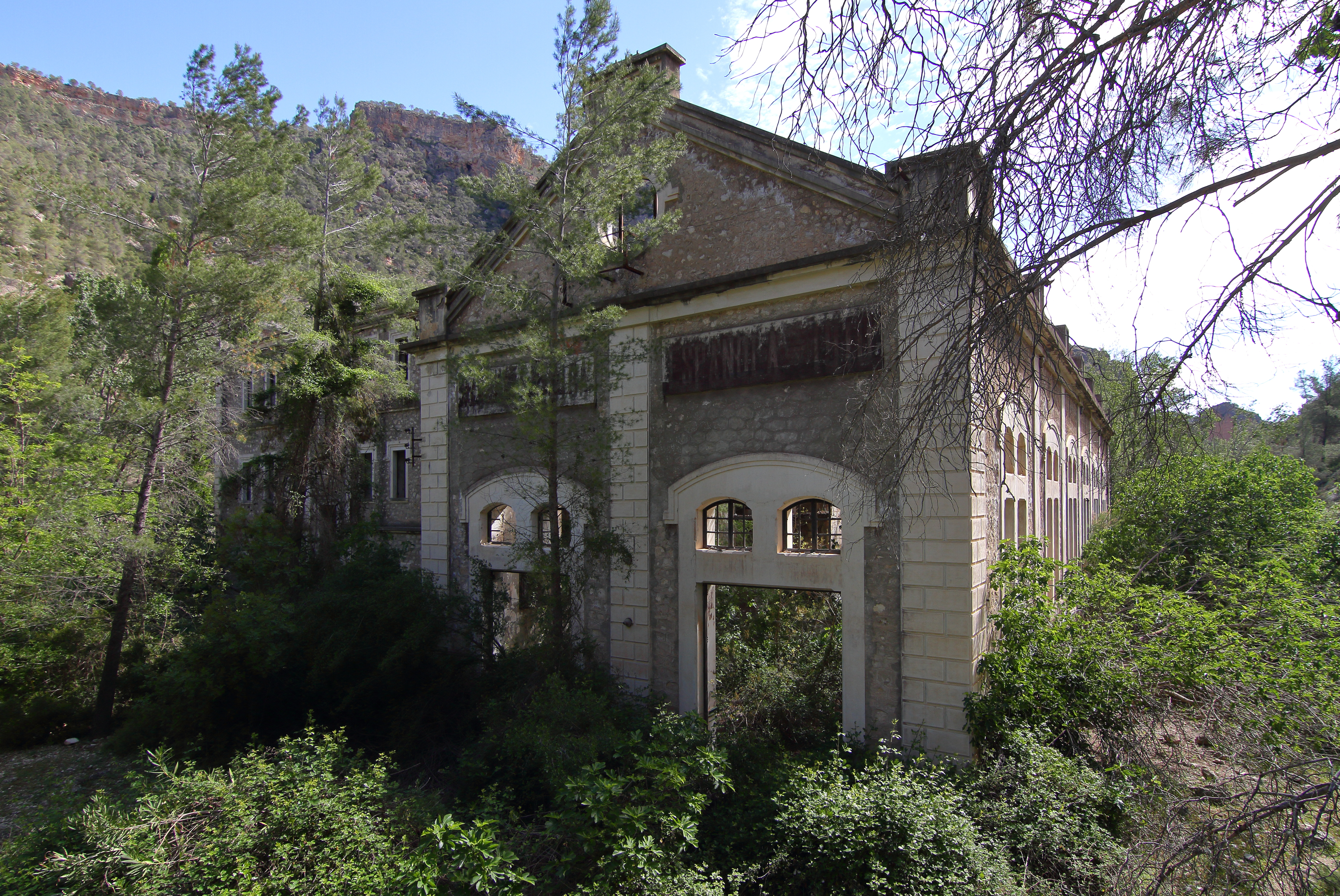 Central eléctrica El Molinar, fachada oeste